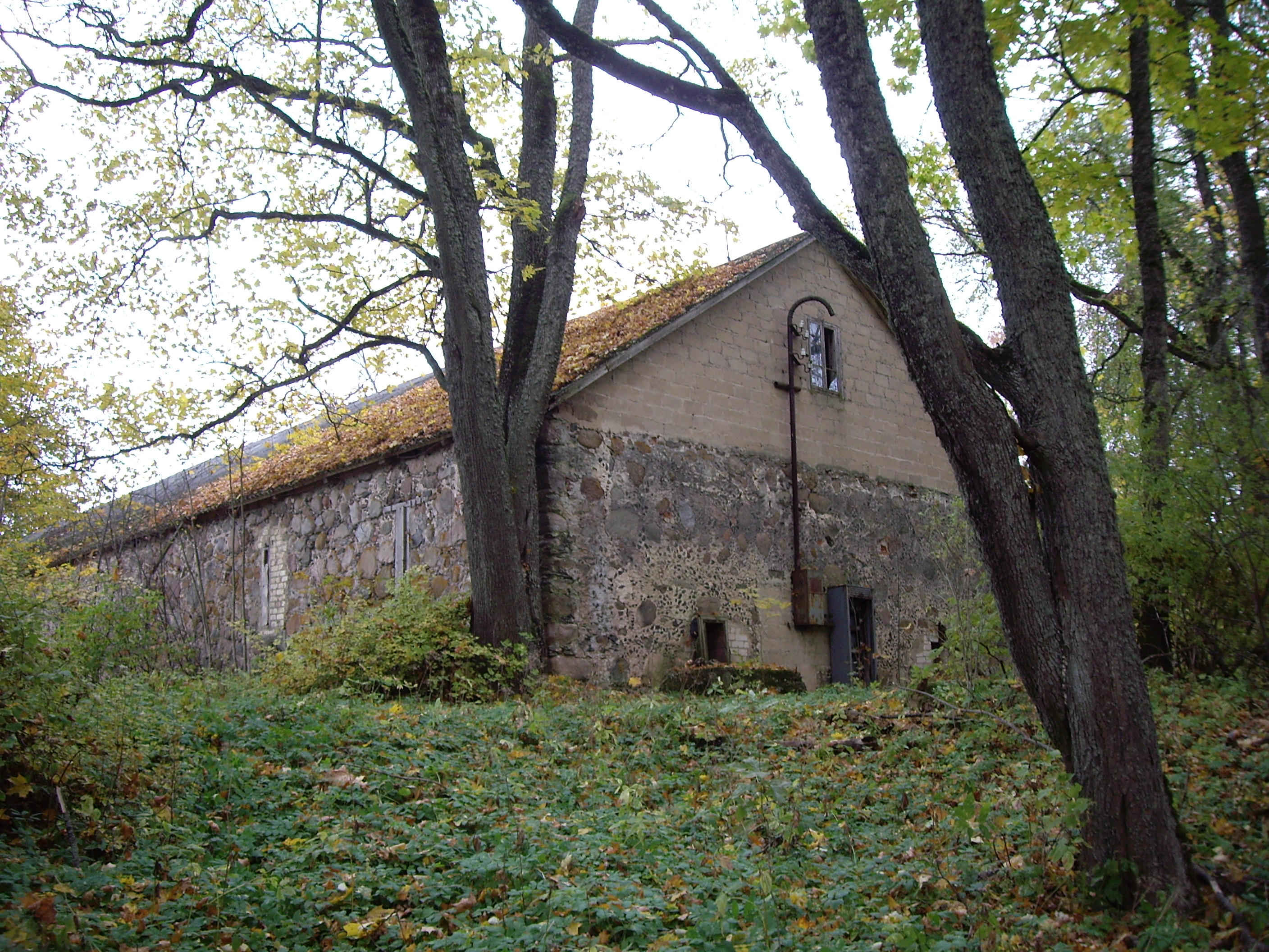 Ilzenbergo dvaro rūmų ansamblio statinys: svirnas. Vaizdas iki 2012 metų rekonstrukcijos.